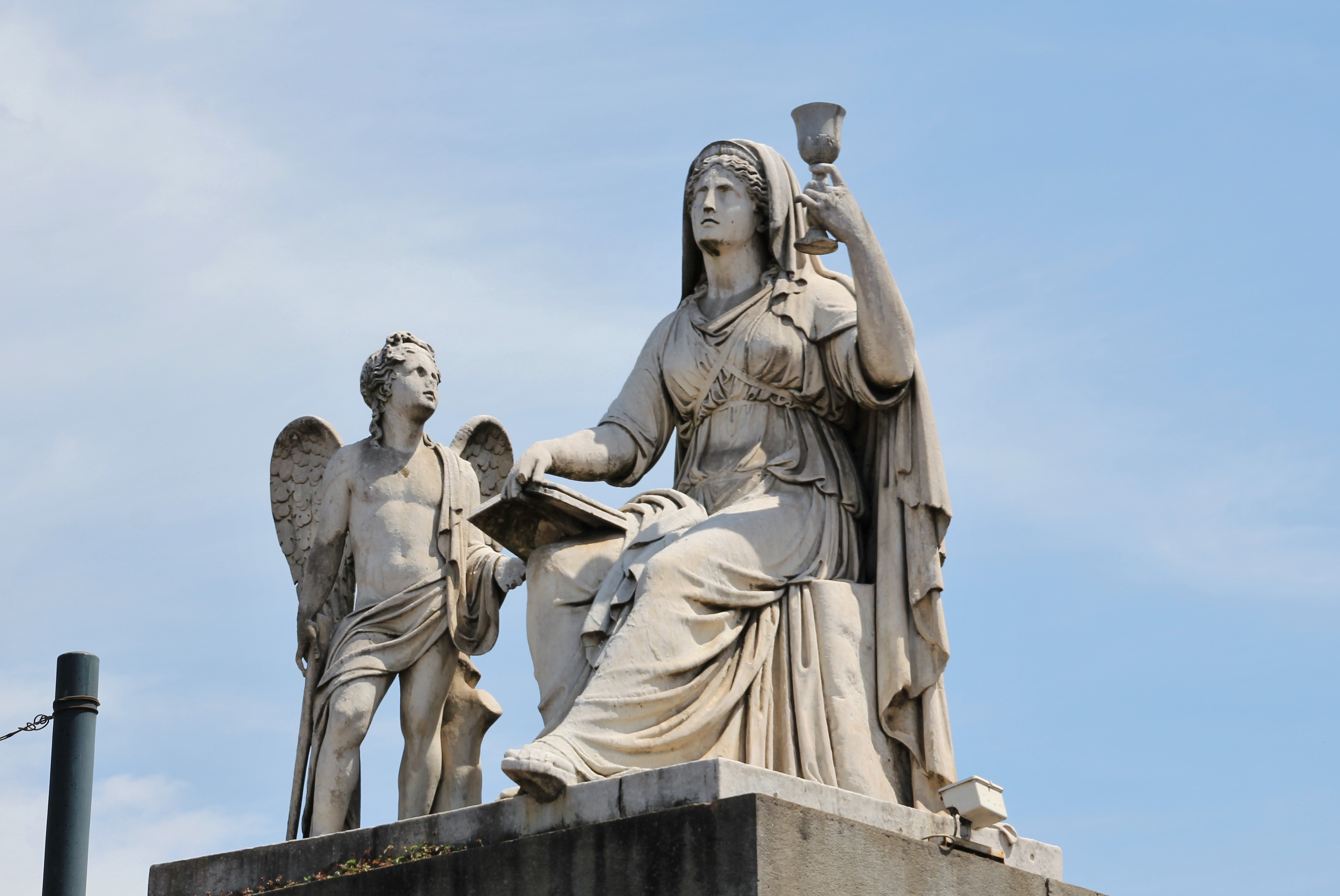 Torino, chiesa della Gran Madre di Dio